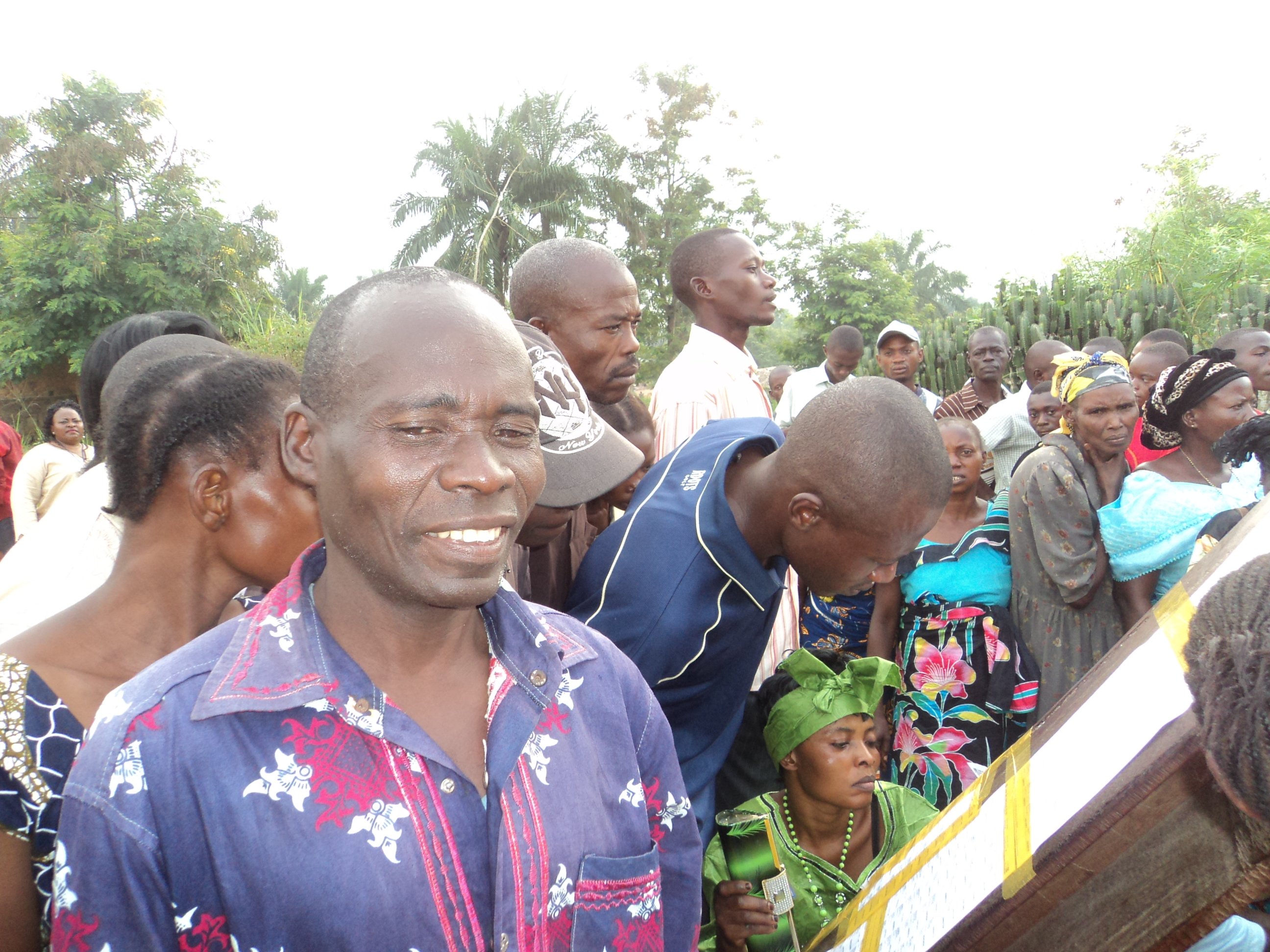 Kindu